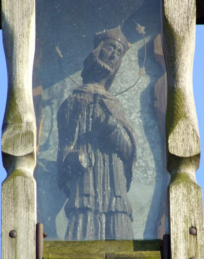 Bargłów Kościelny. Ludowa rzeźba św. Jana Nepomucena.